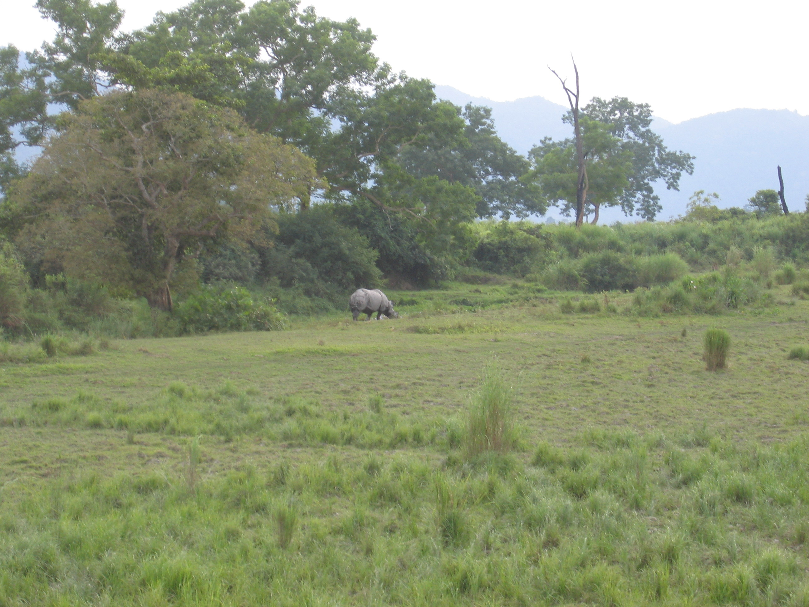 Kaziranga National Park